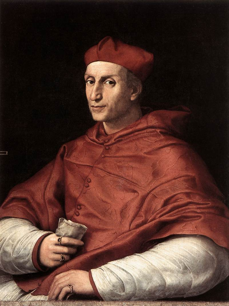 Портрет кардинала Бернардо Довіці да Бібієна